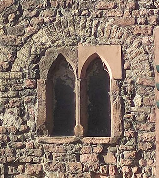 Römerstraße 44 Worms, gotisches Erdgeschoßfenster